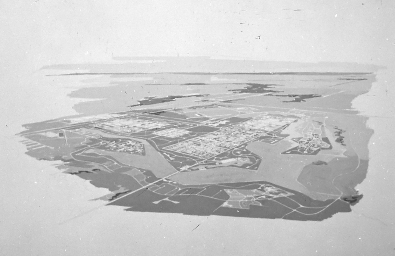 Imagem do Fundo Agência Nacional, do Arquivo Nacional